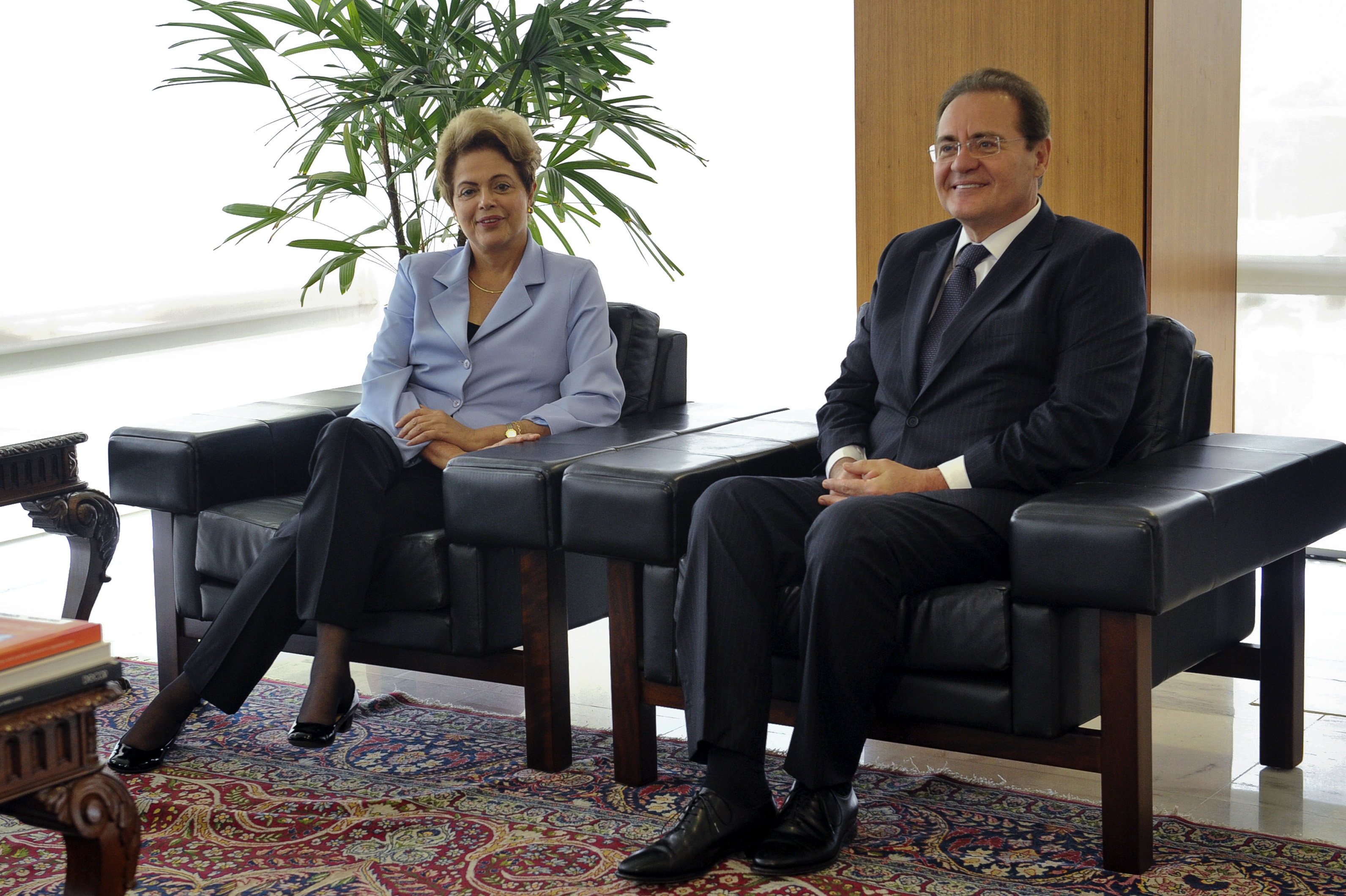 O presidente do Senado Federal, senador Renan Calheiros (PMDB-AL), o ministro-chefe da Casa Civil, Aloizio Mercadante, o presidente da comissão especial da reforma política, senador Jorge Viana (PT-AC), e o relator da comissão, senador Romero Jucá (PMDB-RR) concedem entrevista, no Palácio do Planalto, após reunião com a presidente da República, Dilma Rousseff. (E/D): presidente da República, Dilma Rousseff; presidente do Senado Federal, senador Renan Calheiros (PMDB-AL) Foto: Jane de Araújo/Agência Senado